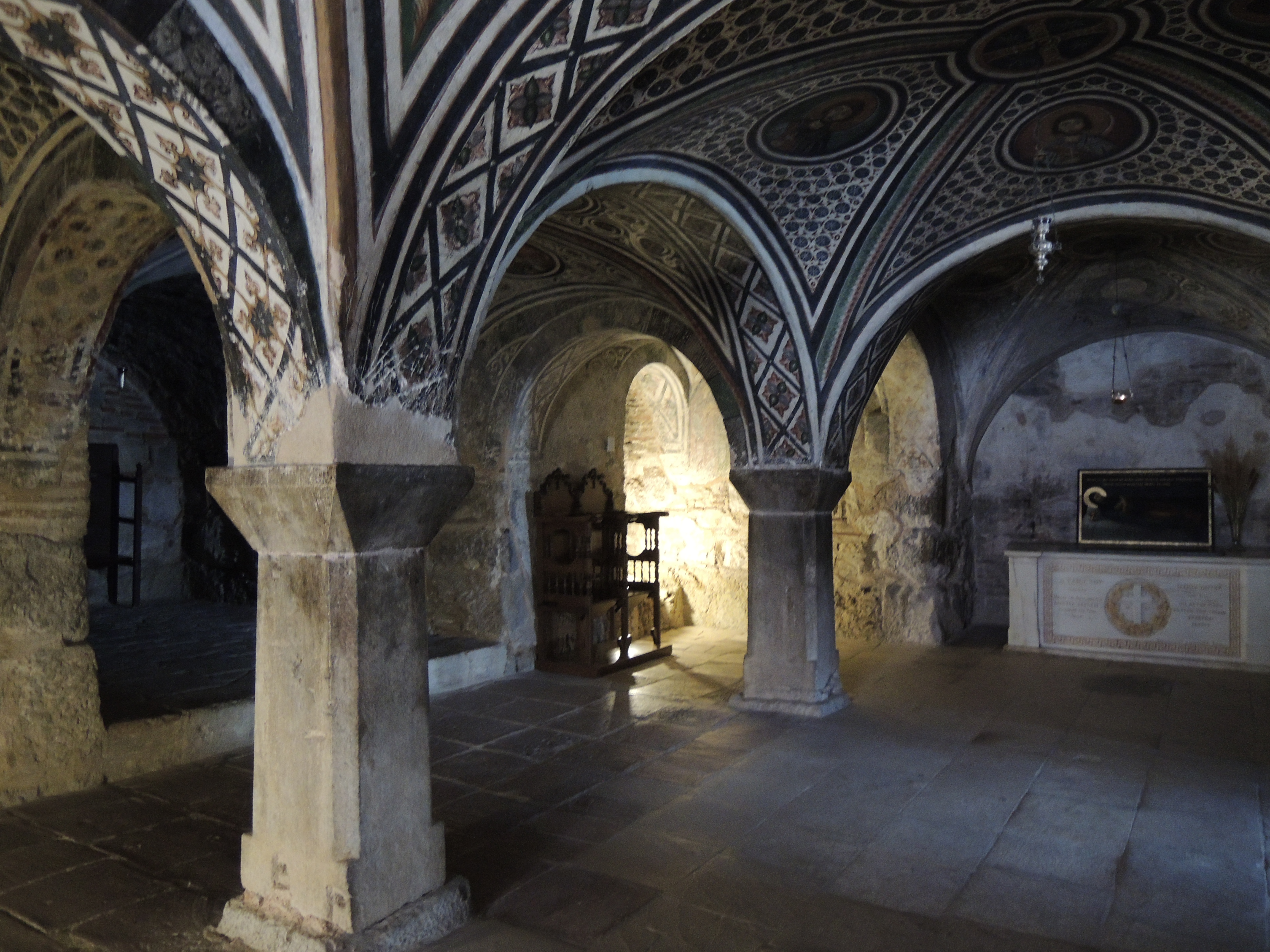 Монастырь Осиос Лукас